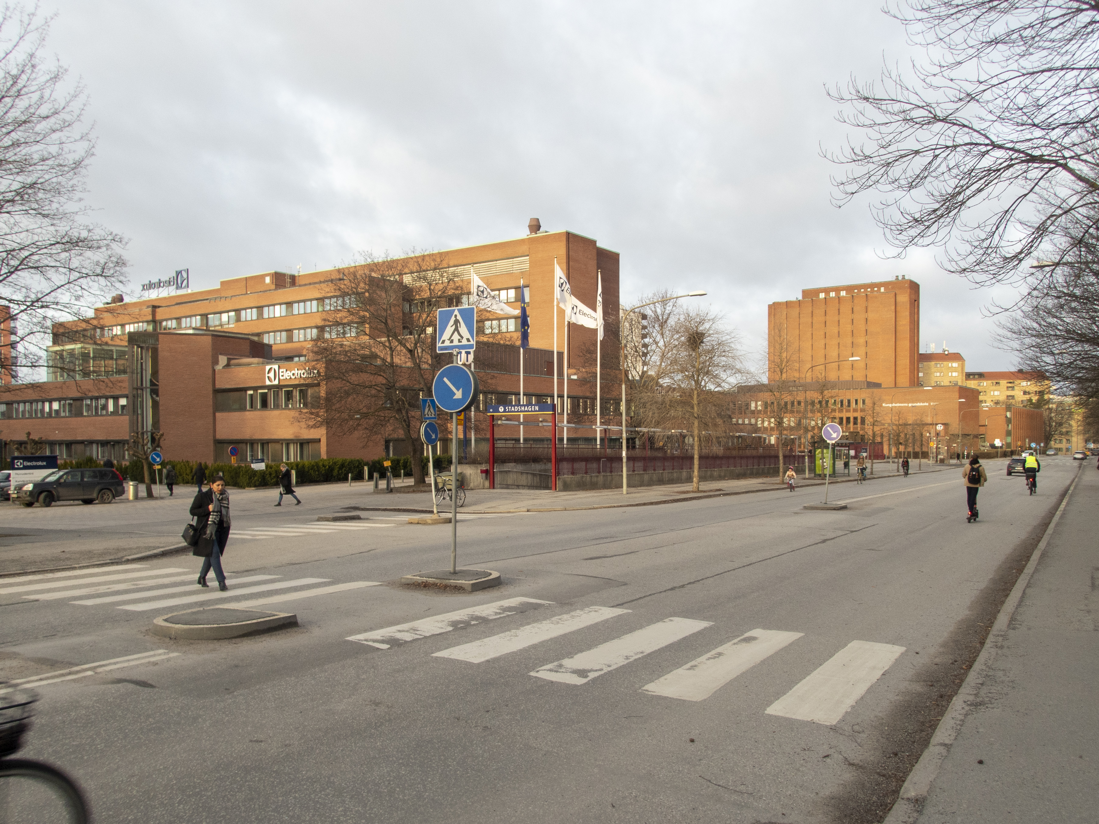 Electrolux huvudkontor. Gångaren 13, Kellgrensgatan 9-11, Sankt Göransgatan 143 Stockholm. Nybyggnadsår 1966 Tecab Konsulterande Arkitekter AB genom Anders tTengbom (Arkitekt) . Byggnaden uppfördes ursprungligen som barnklinik till S:t Görans sjukhus.